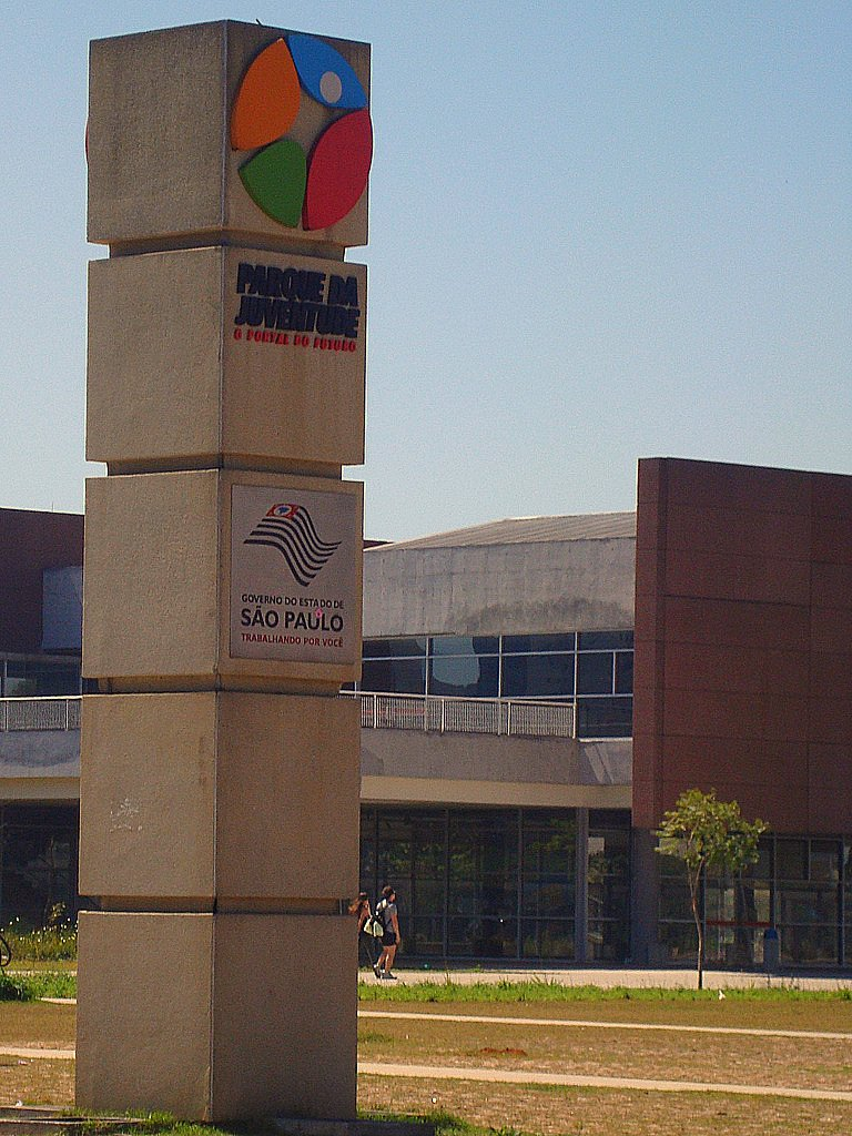 Foto do logo do Parque da Juventude em Santana, bairro da cidade de São Paulo.